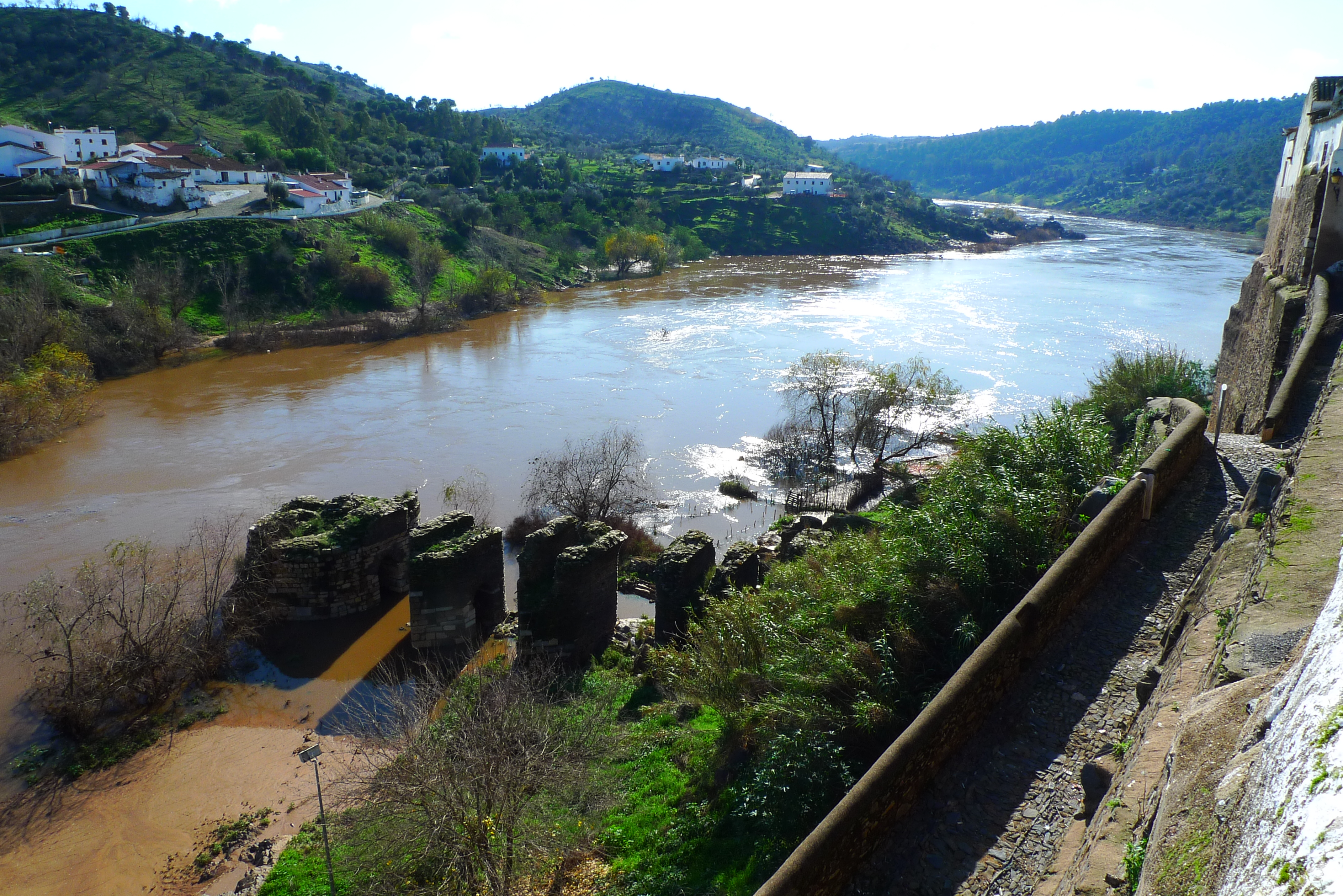 Vista desde la muralla. La fotografía fue tomada después de una riada moderada. This file was uploaded for Wiki Loves Monuments in Portugal with the unique identifier 70233.